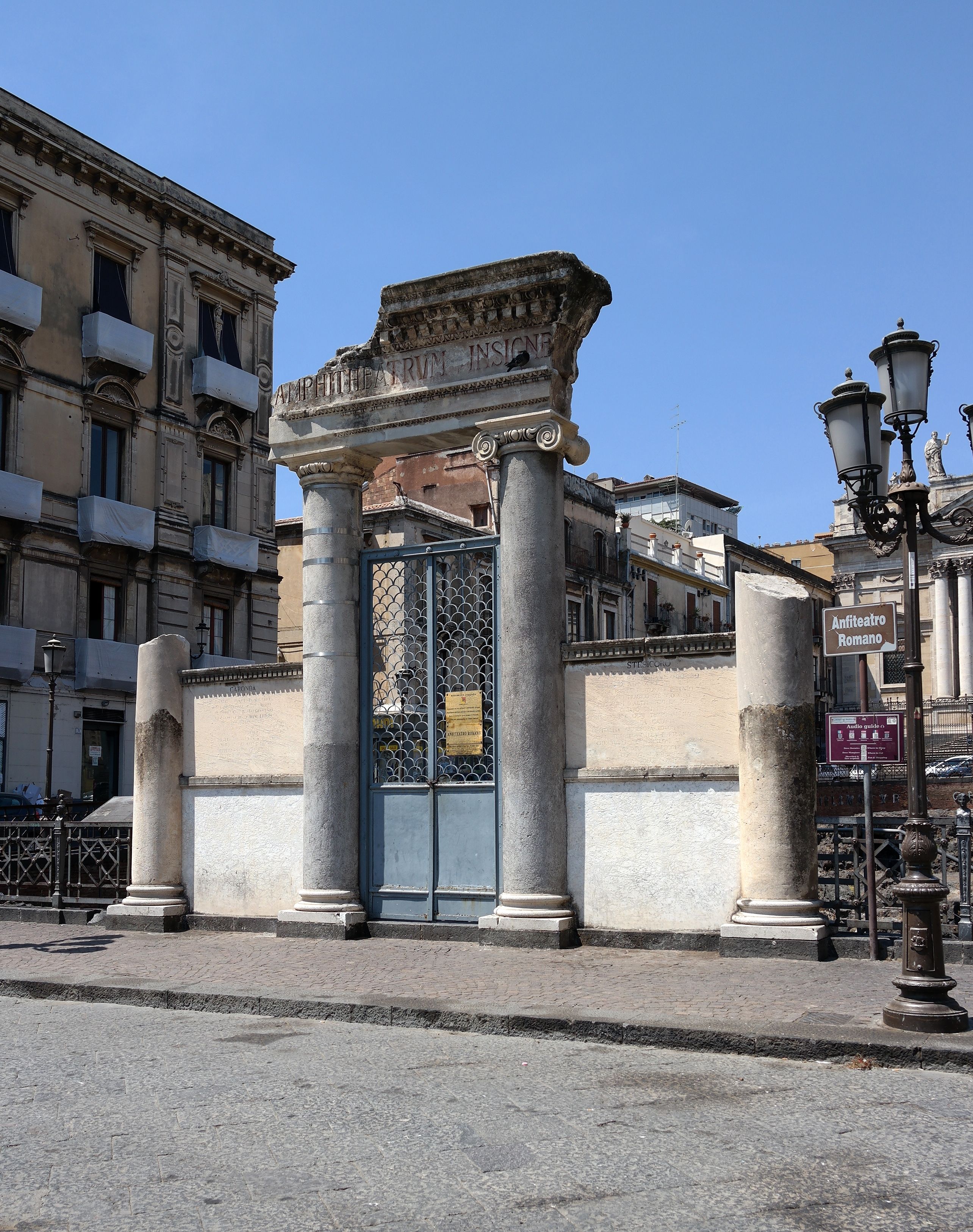 Porta dell'Anfiteatro romano a Catania